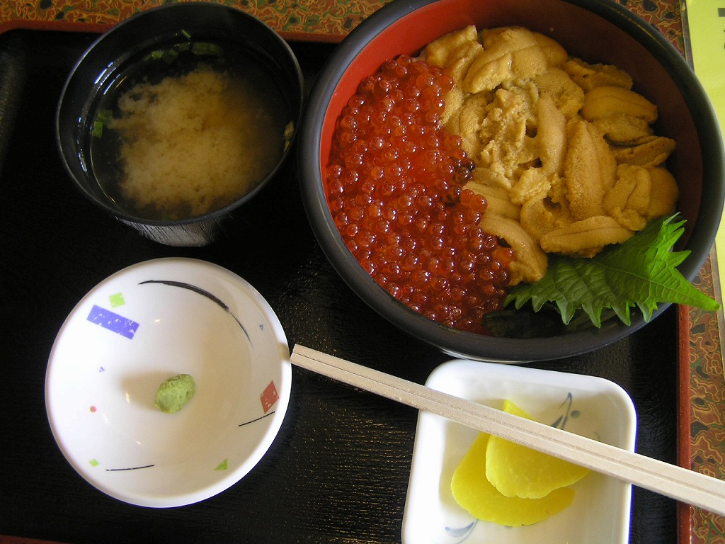 ウニイクラ丼 2200円 生うに丼 2300円 赤ばふん生ウニ丼 3000円 いくら丼 1500円 積丹半島 お食事処 みさき